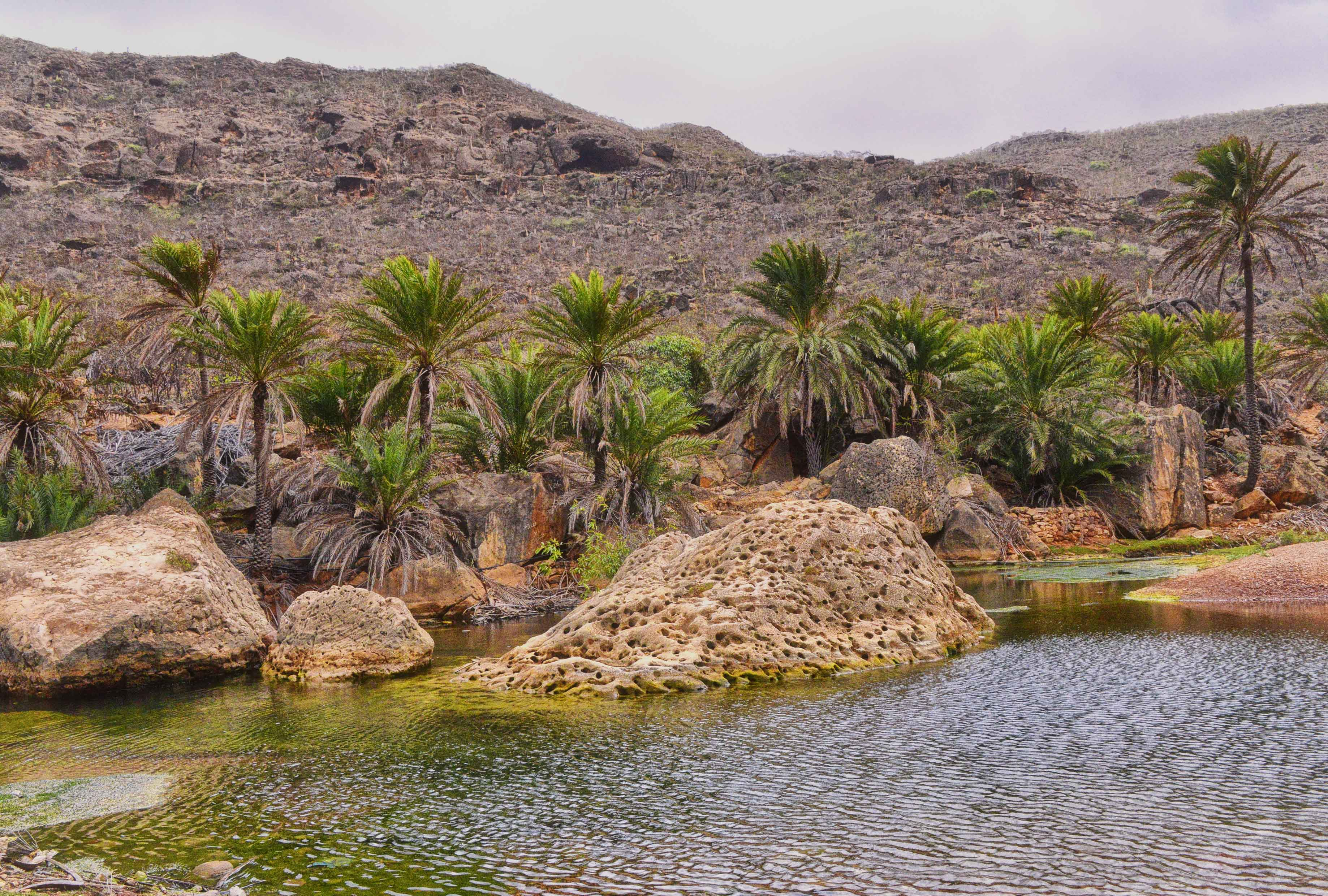 Yemen